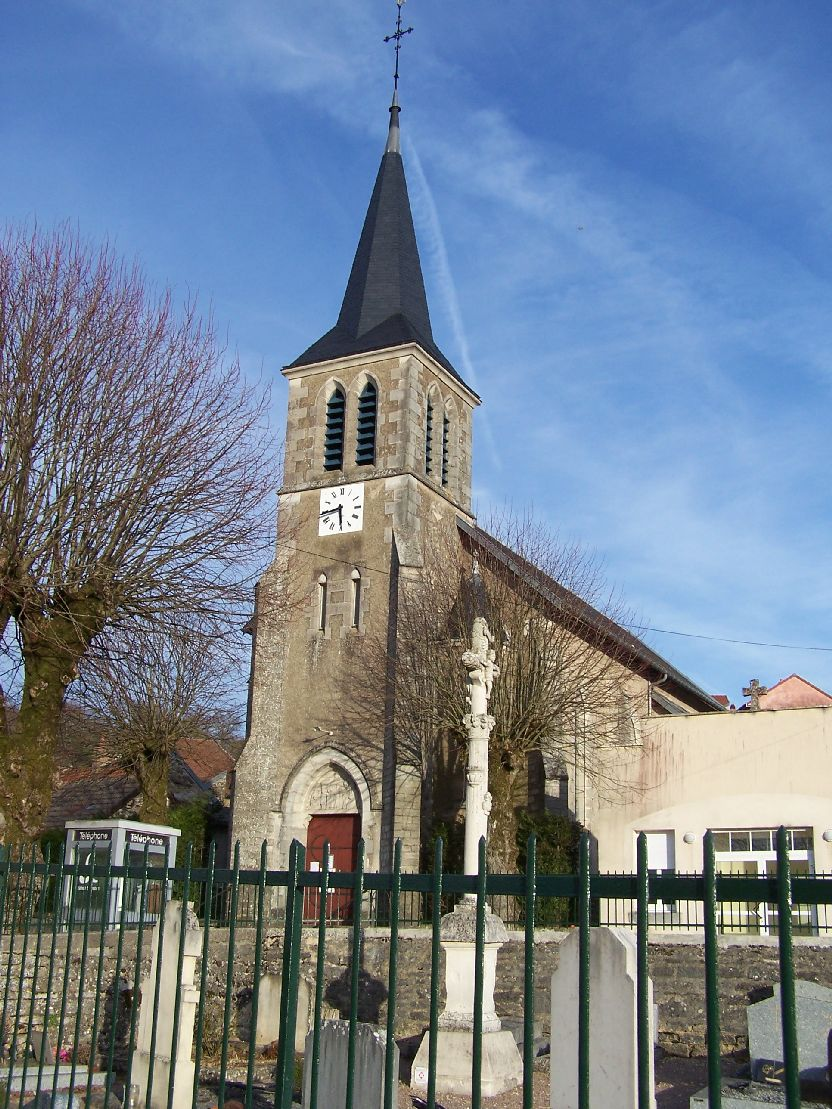 Eglise de GRENNANT LES SOMBERNON - FRANCE -21